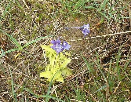 Pinguicula spec., grassette